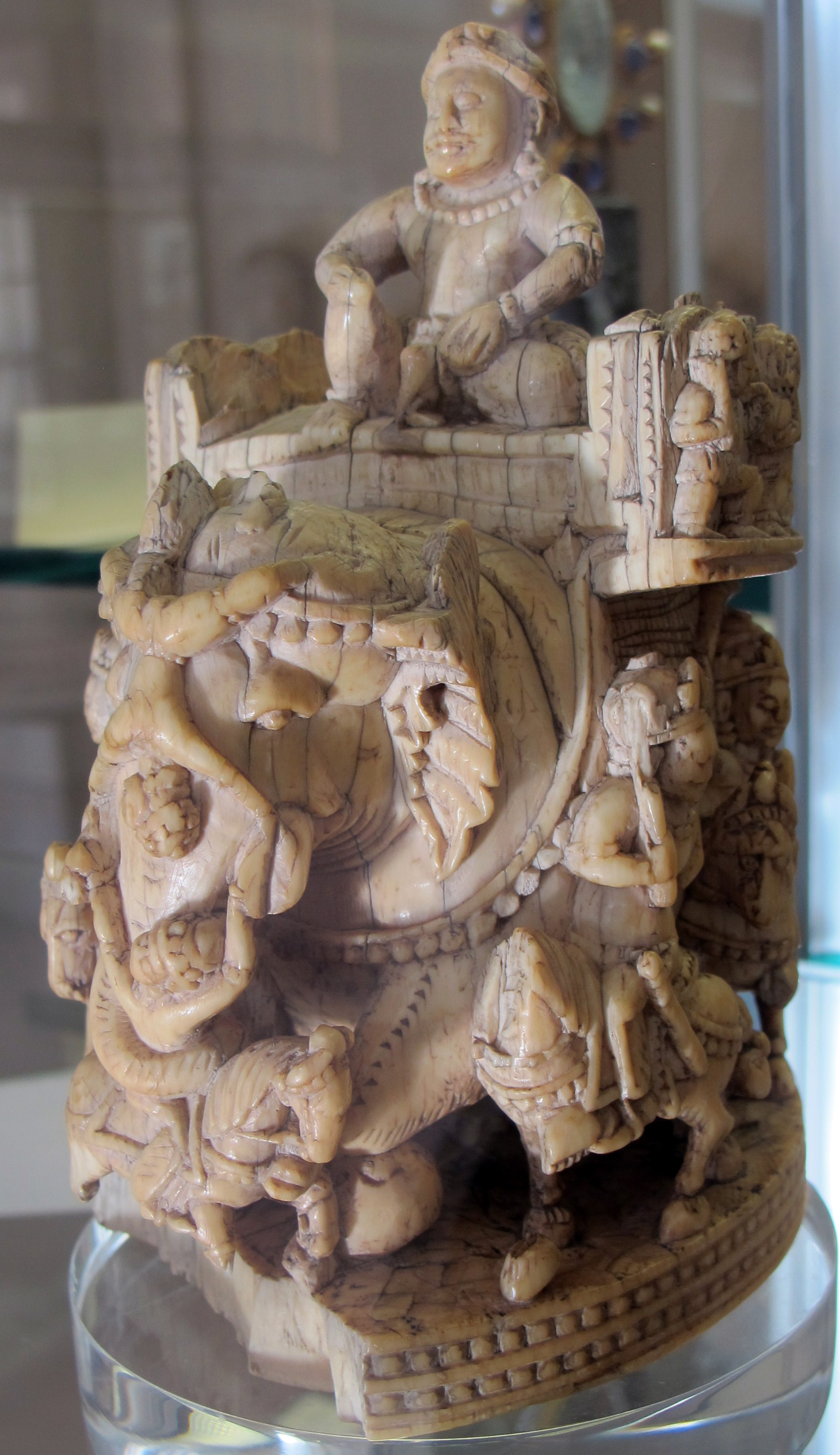 Arte indiana, elefante detto di carlomagno, pezzi x scacchi in avorio, IX-X sec.